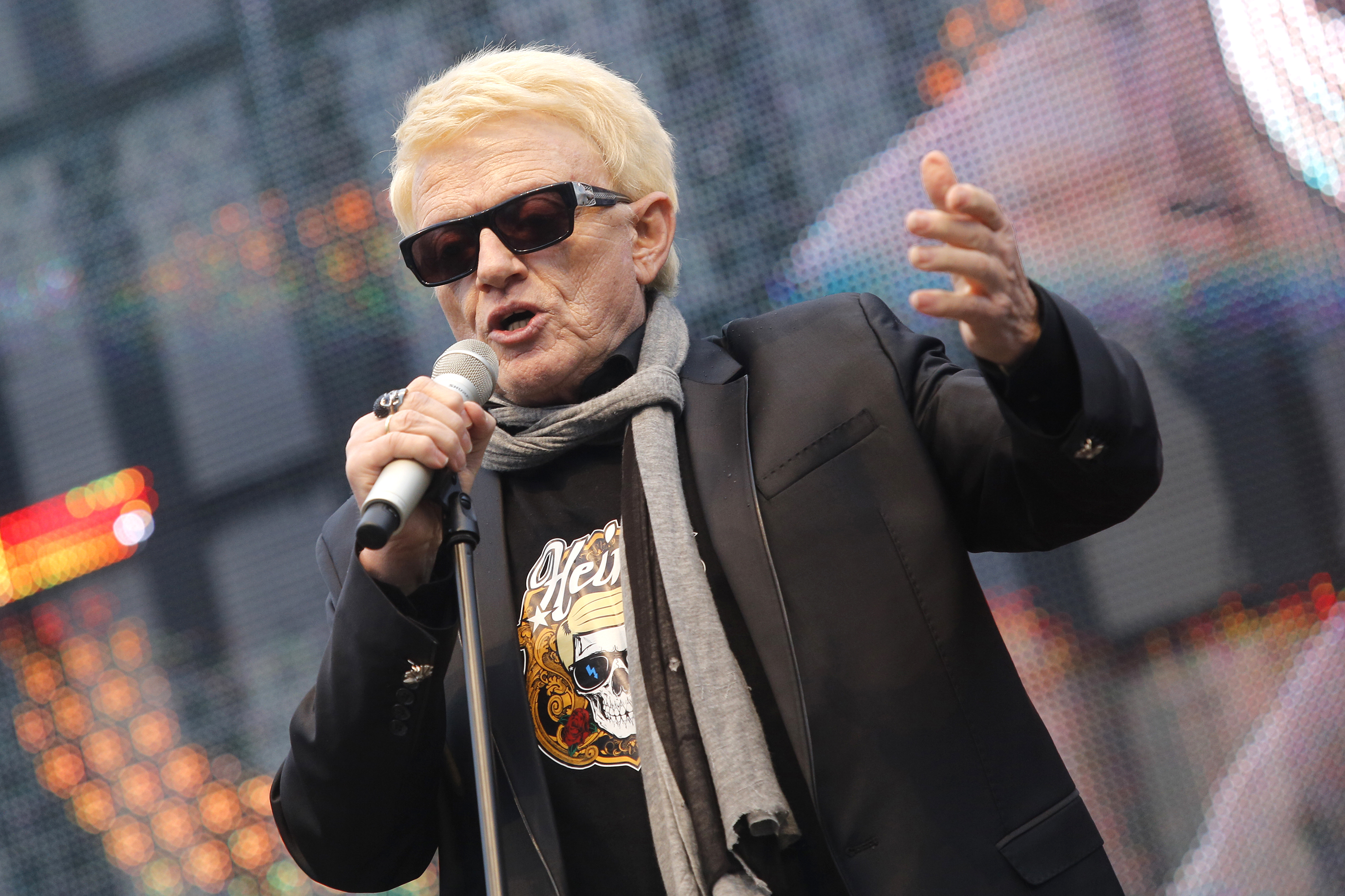 Der deutsche Musiker Heino beim Wolkenkratzer-Festival 2013 in Frankfurt am Main.